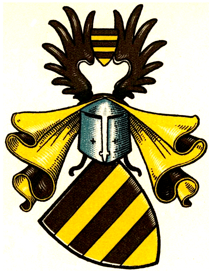 Wappen derer von Pallandt